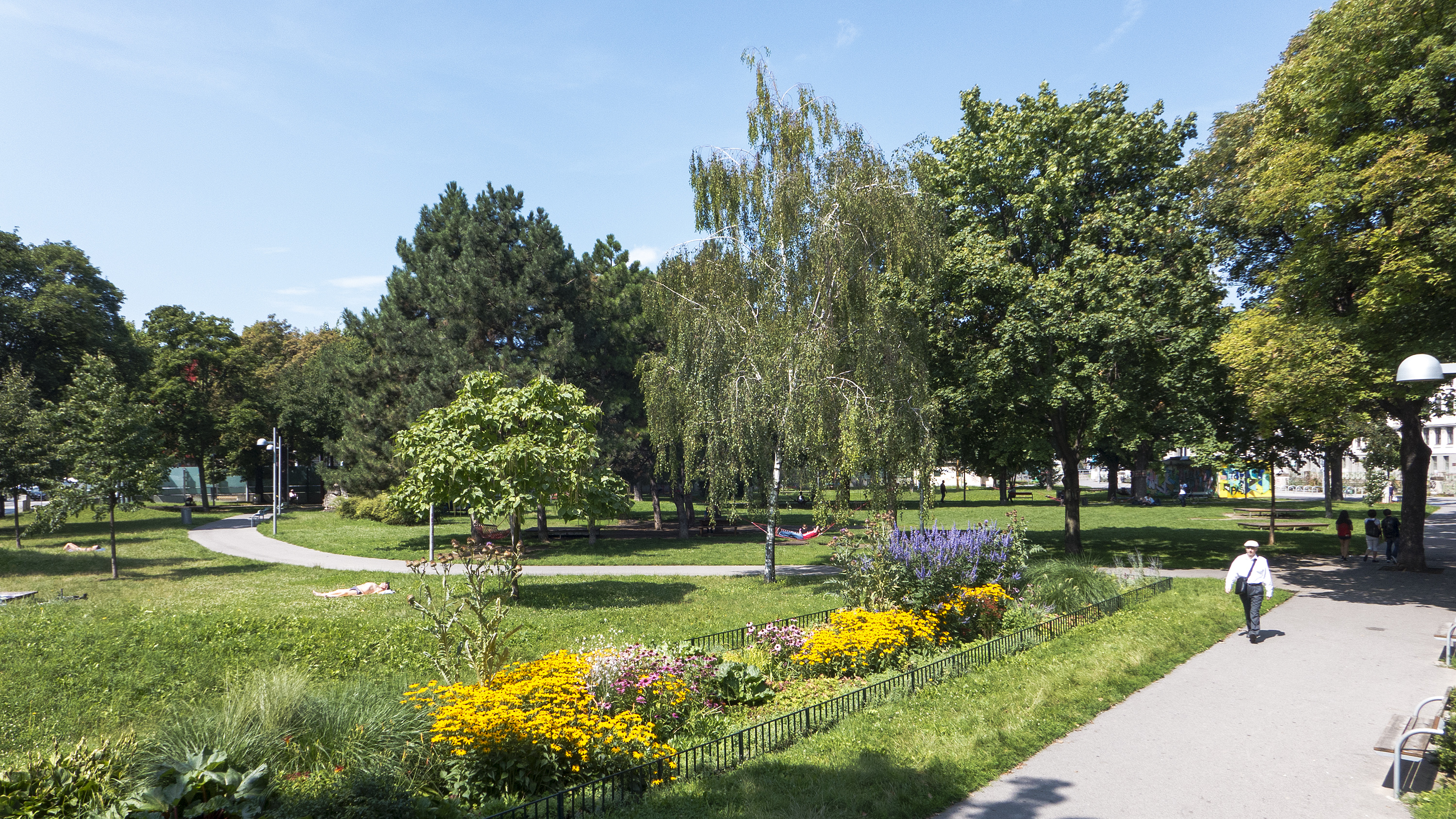 Der Bruno-Kreisky-Park in Wien 5